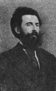 Димитриос Лалас